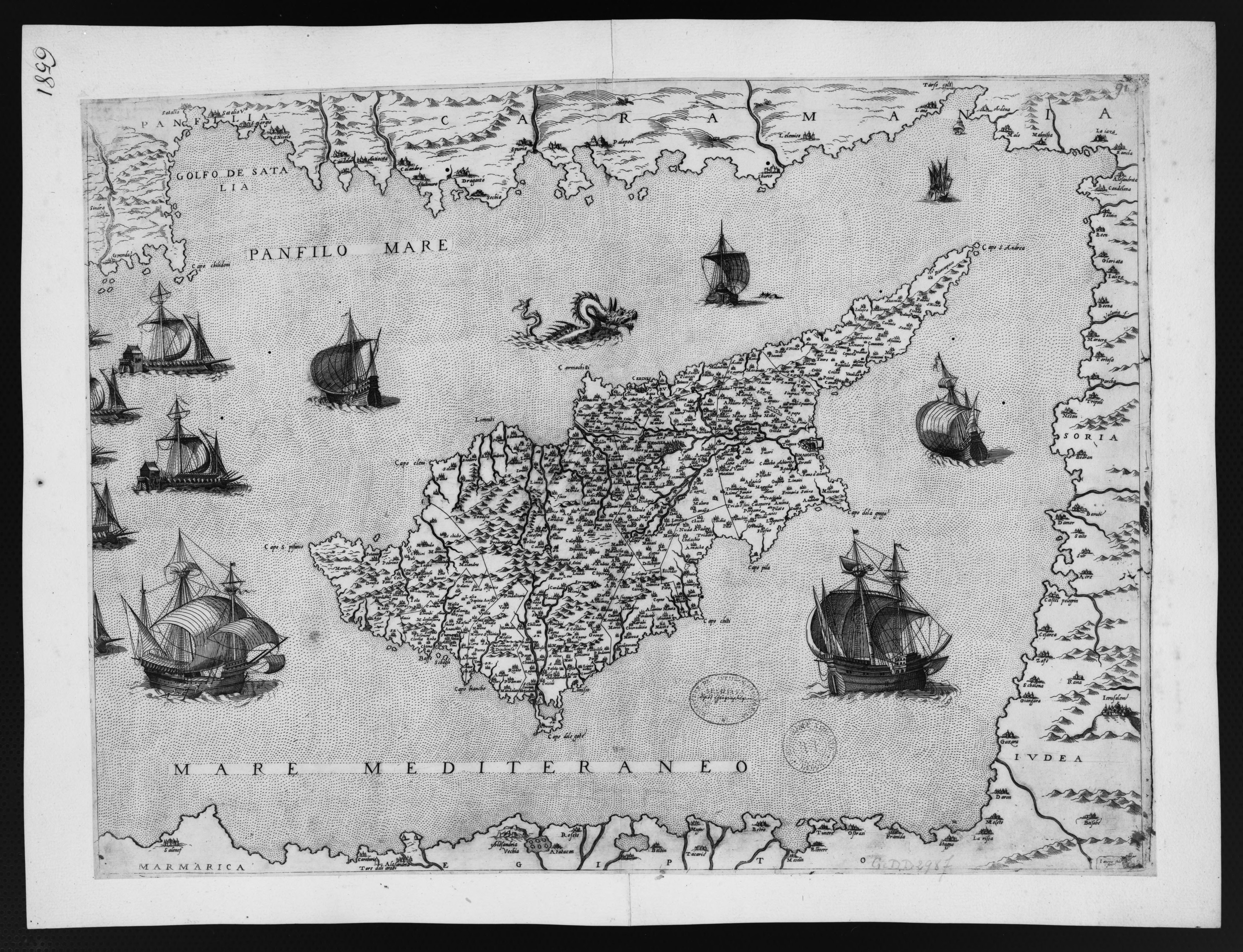 Carte de l'île de Cypre et d'une partie de la côte de Caramanie, de Syrie et d'Egypte / Iacomo Frac. fecit.